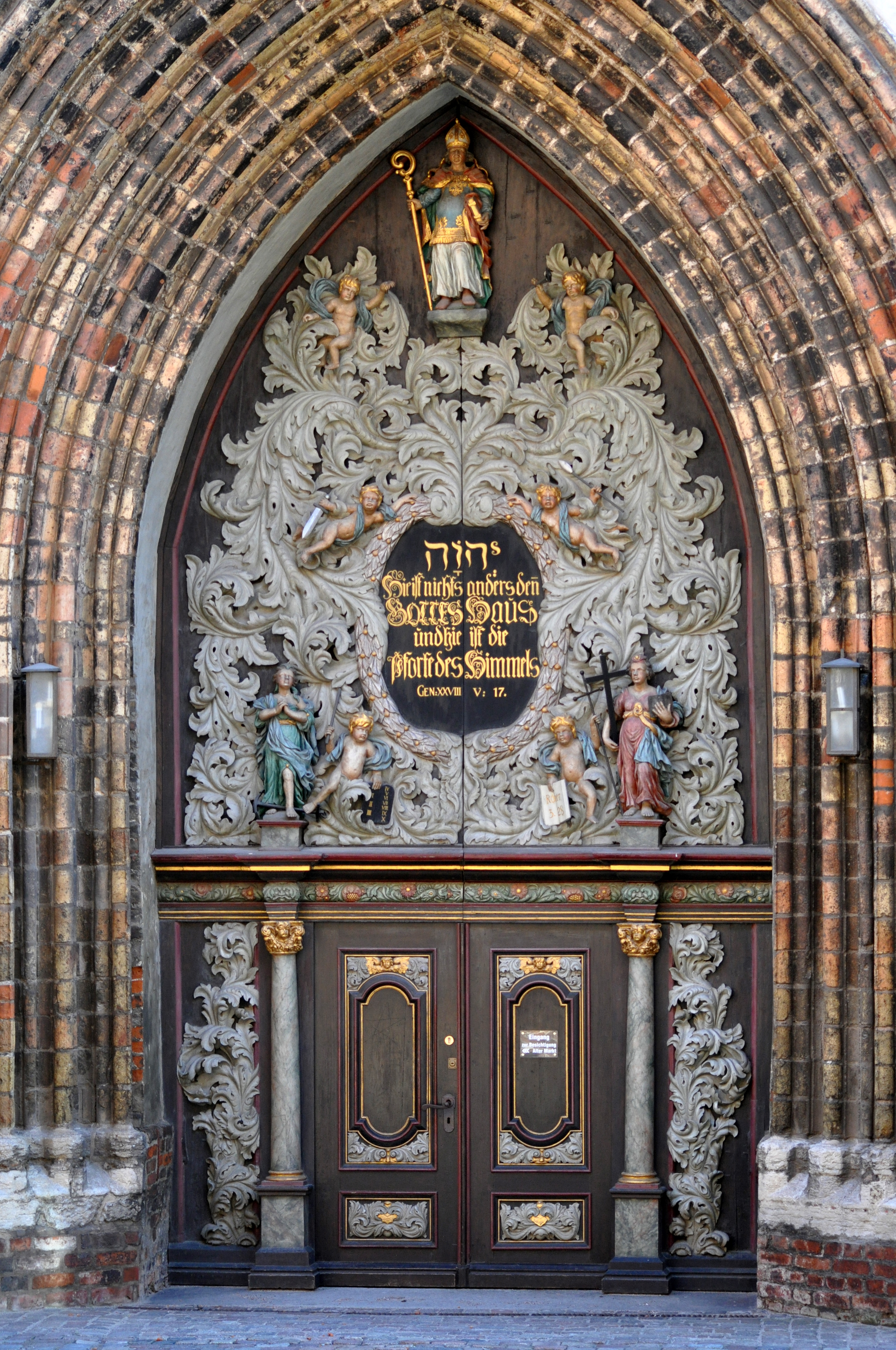 Detail am Westportal der St.-Nikolai-Kirche (Stralsund).